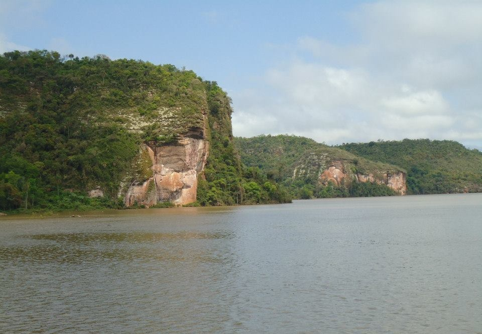 Peñón del Teyú Cuaré ubicado en el Parque provincial Teyú Cuaré (en guaraní: teýú, lagarto, kuaré, cueva; es decir: "Cueva del lagarto") es un área natural protegida de la provincia argentina de Misiones. En este lugar se basa la escritora misionera Laura Kachorroski en su novela La Cueva del Lagarto.